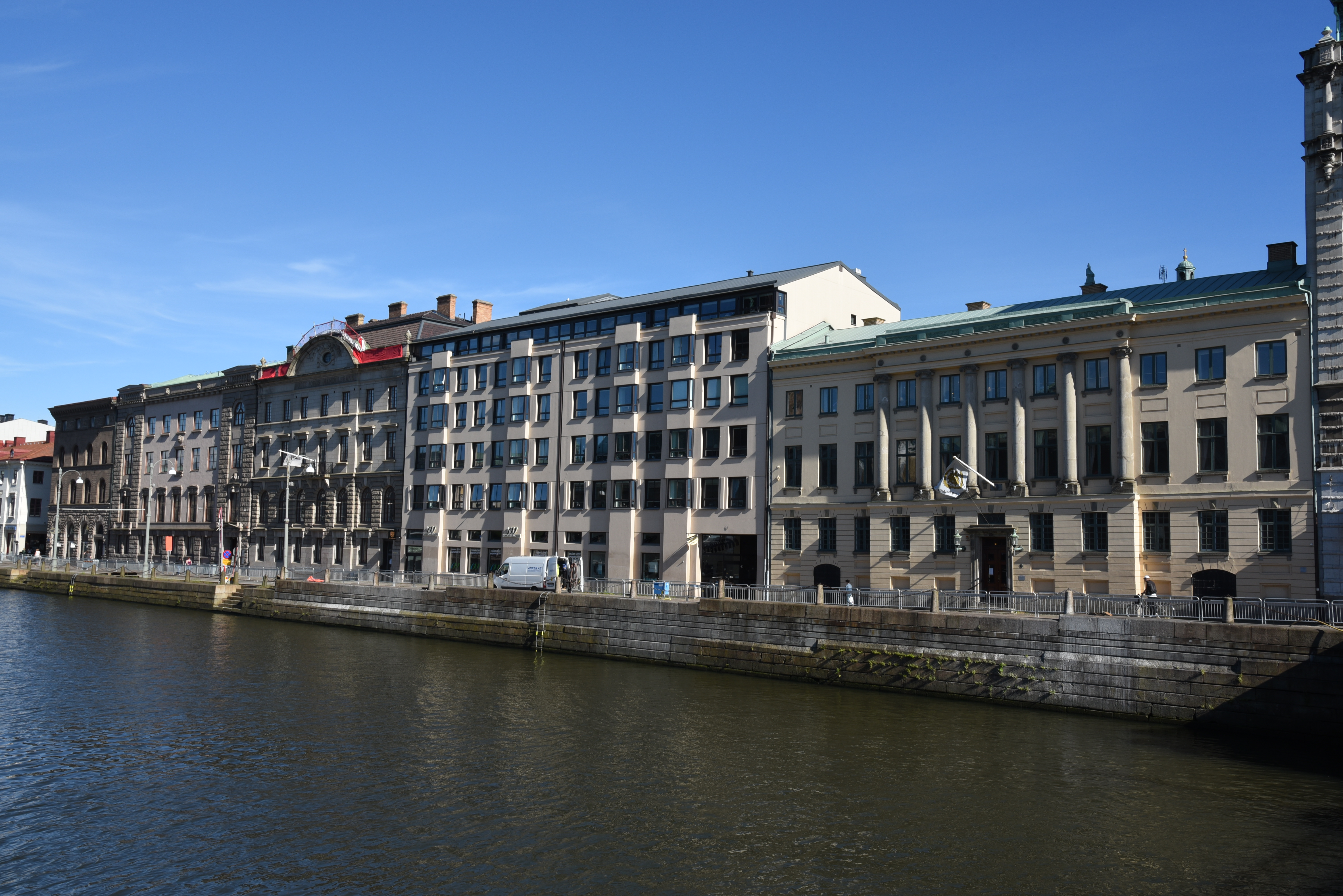 16 kvarteret Kommerserådet, Södra Hamngatan 23-11, i stadsdelen Inom Vallgraven i Göteborg.